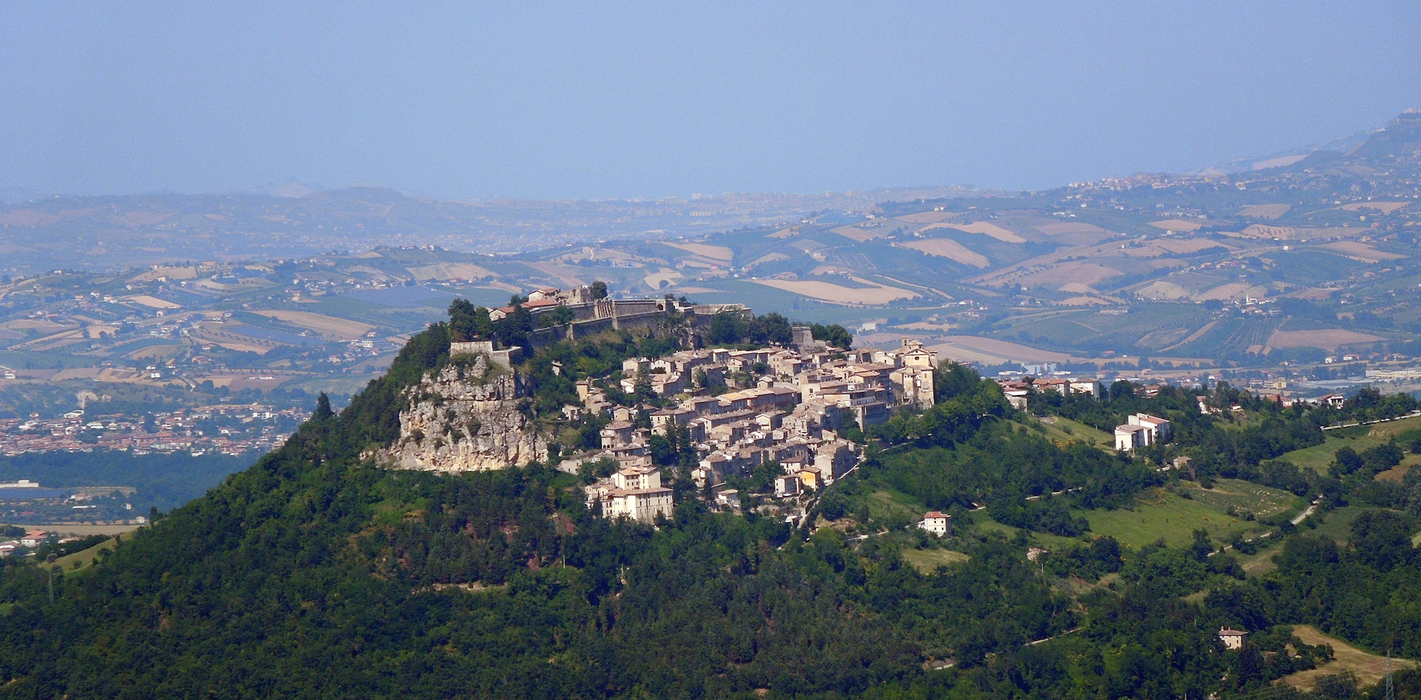 Panorama sulla fortezza ed il paese di Civitella del Tronto (TE), fotografato dalla SP52.